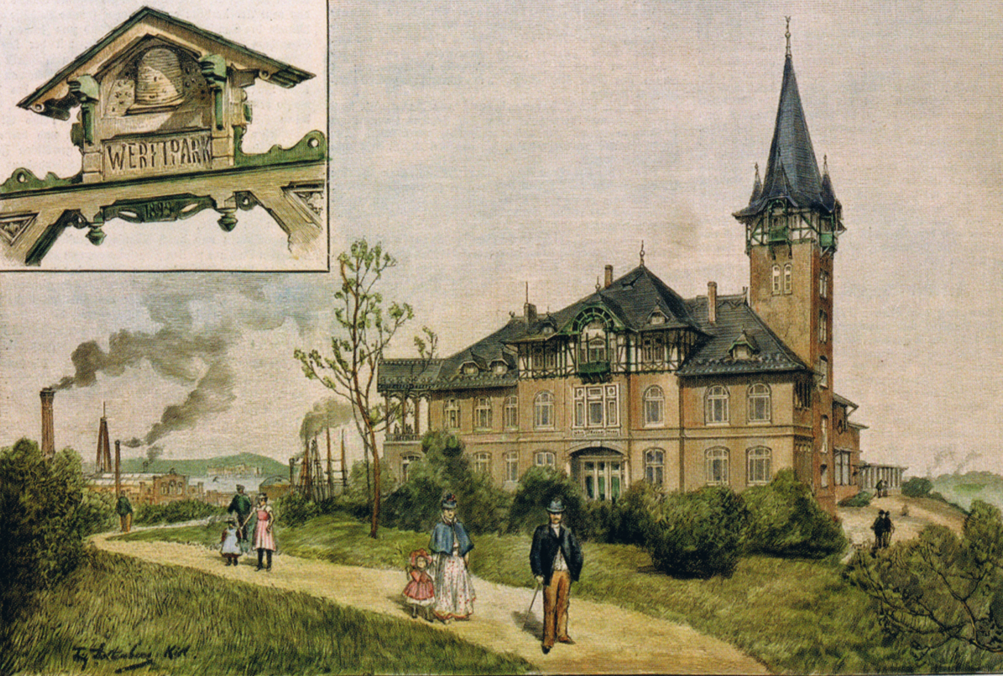 Das Hauptgebäude des Arbeiterparks der Kaiserlichen Werft in Kiel, Holzstich und nachträgliche koloratirte Zeitschriftenillustration von Fritz Stoltenberg